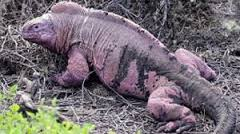 Esemplare di iguana rosa delle Galápagos